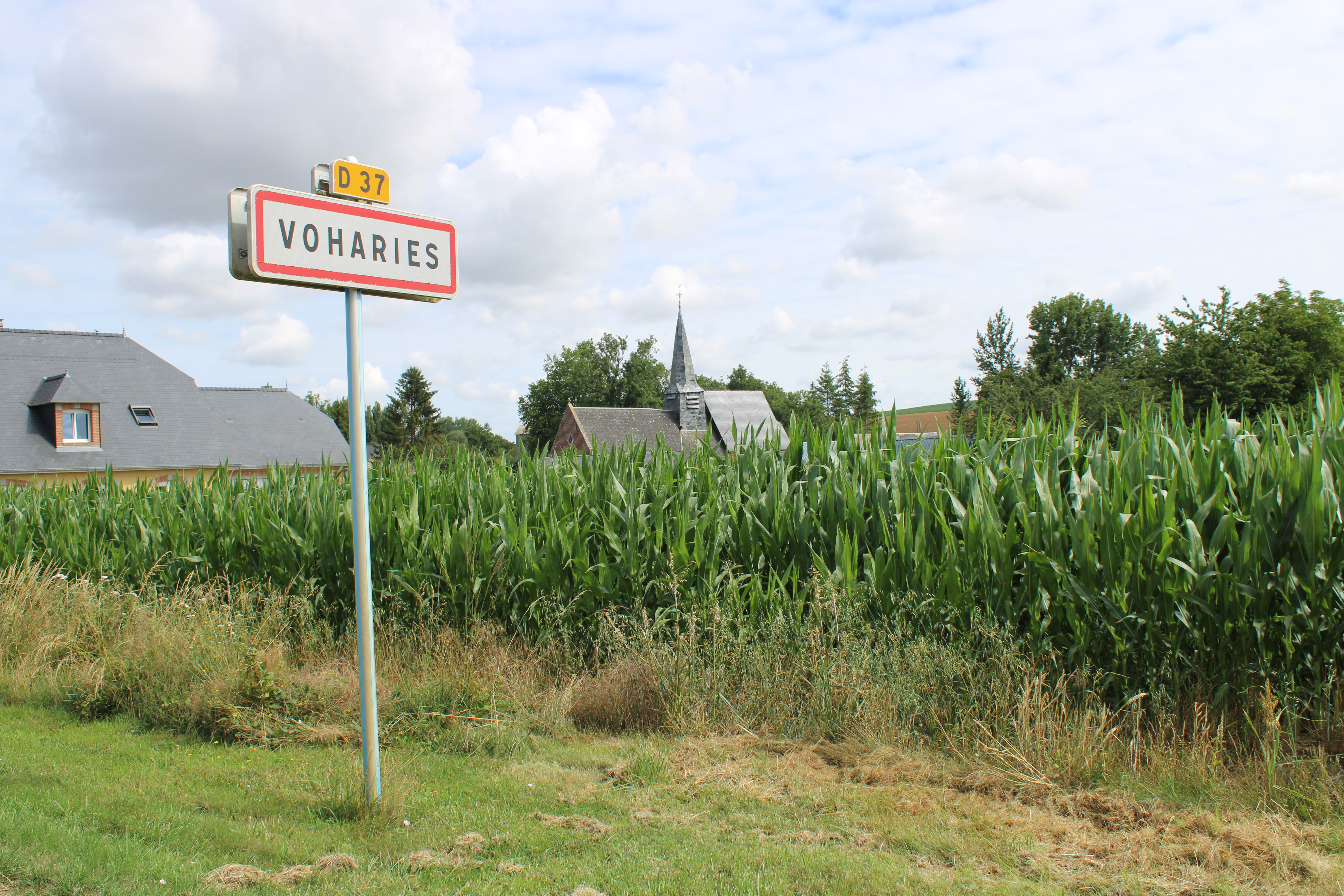 Entrée du village